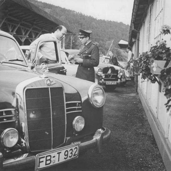 Zentralbild Wittig 3.9.1960 Schnelle und exakte Abwicklung des Reiseverkehrs am Grenzkontrollpunkt Wartha UBz: Mitarbeiter des AZKW kontrollieren die Ausweispapiere von Westdeutschen Messegästen.